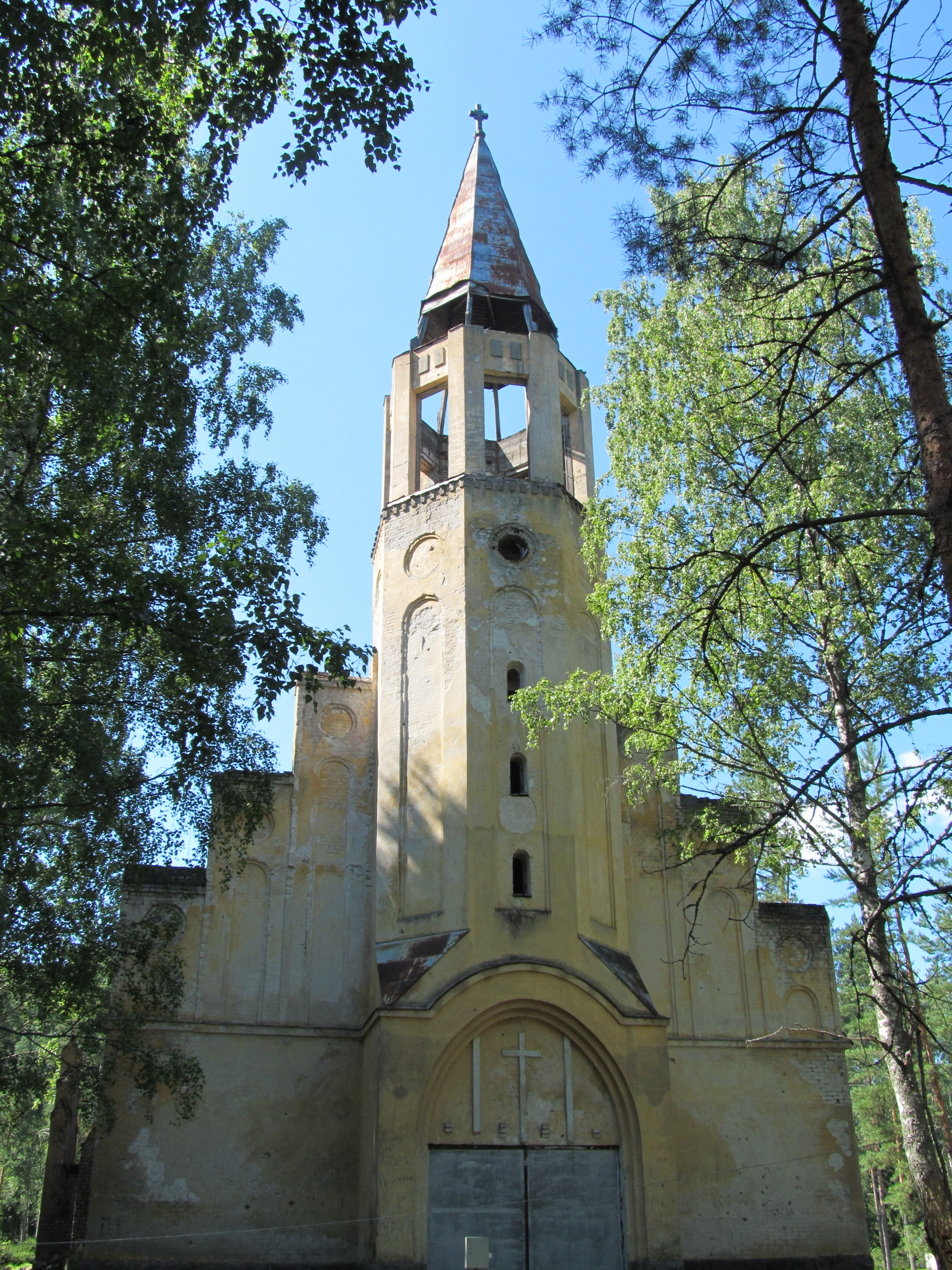 Лютеранская кирха: Ромашки, Приозерский район, Ленинградская область